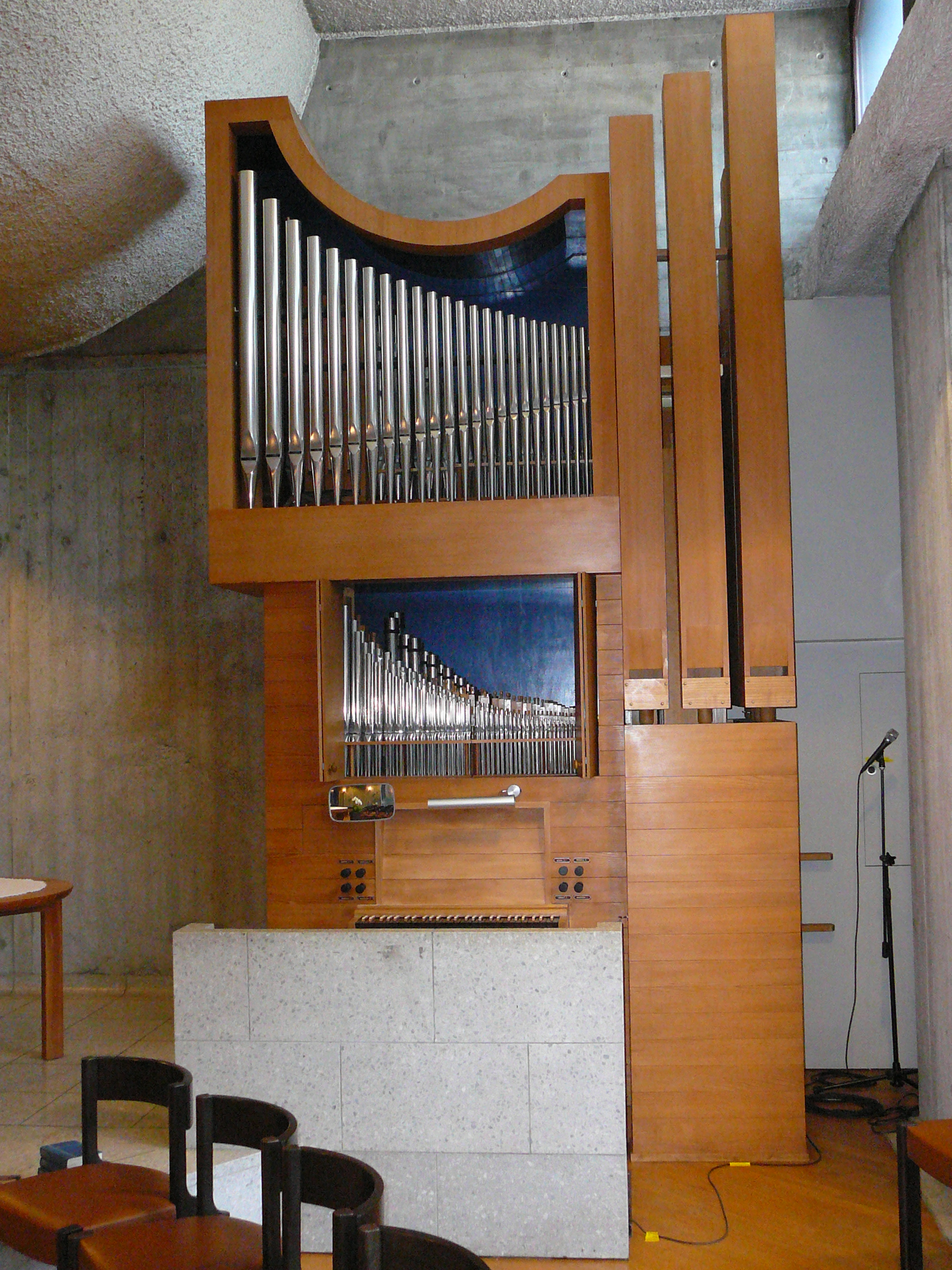 Römisch-katholische Kirche St. Mauritius Regensdorf, Orgel